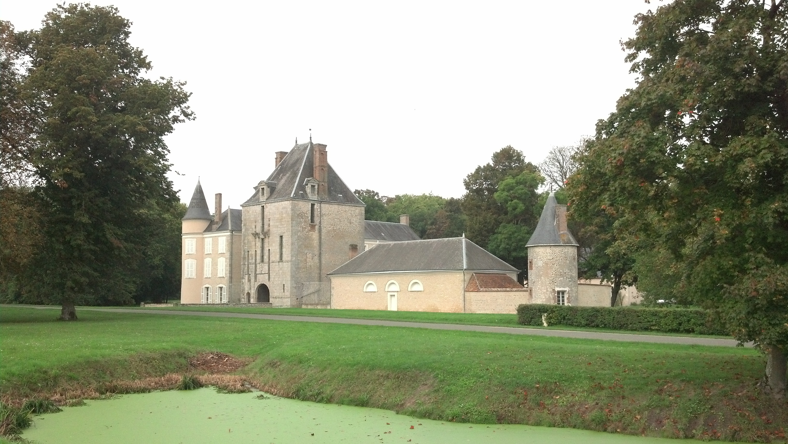 Château de Saint-Michel .